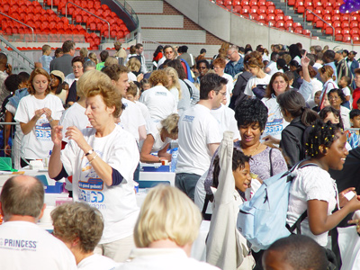 meningokokken vaccinatiecampagne ArenA 2002 GG&GD Amsterdam